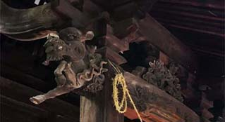 戦の神を象徴するような、蹄を持った獅子の彫刻で出来た本殿の木鼻